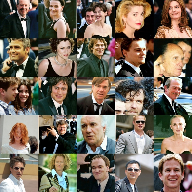 Montage de photos personnelles du festival de Cannes (prises dans les années 1990 et 2000)